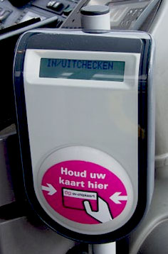 OV-chipkaartlezer (CICO) in een lijnbus.